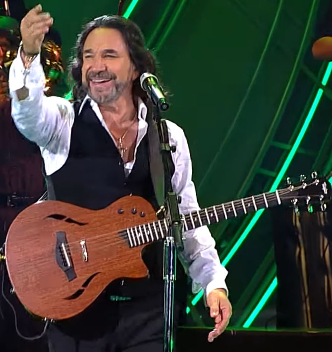 Marco Antonio Solís en un concierto de Viña del Mar